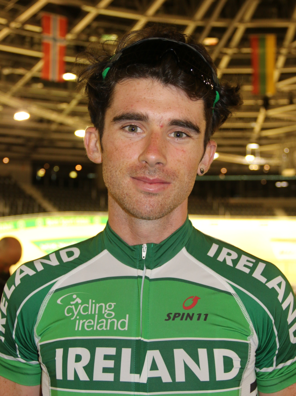 Felix English, irischer Radsportler